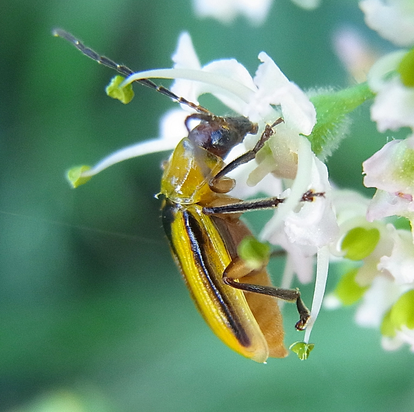 Diabrotica virgifera aus Österreich - Niederösterreich - Mönichskirchen am 6. August 2015 auf Bärenklau